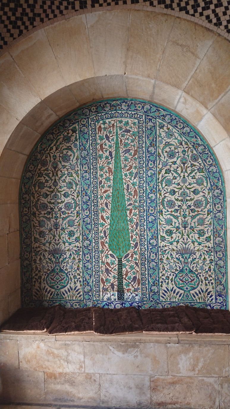 קרמיקה של דוד אוהניסיאן בית אות המוצר הירושלמי